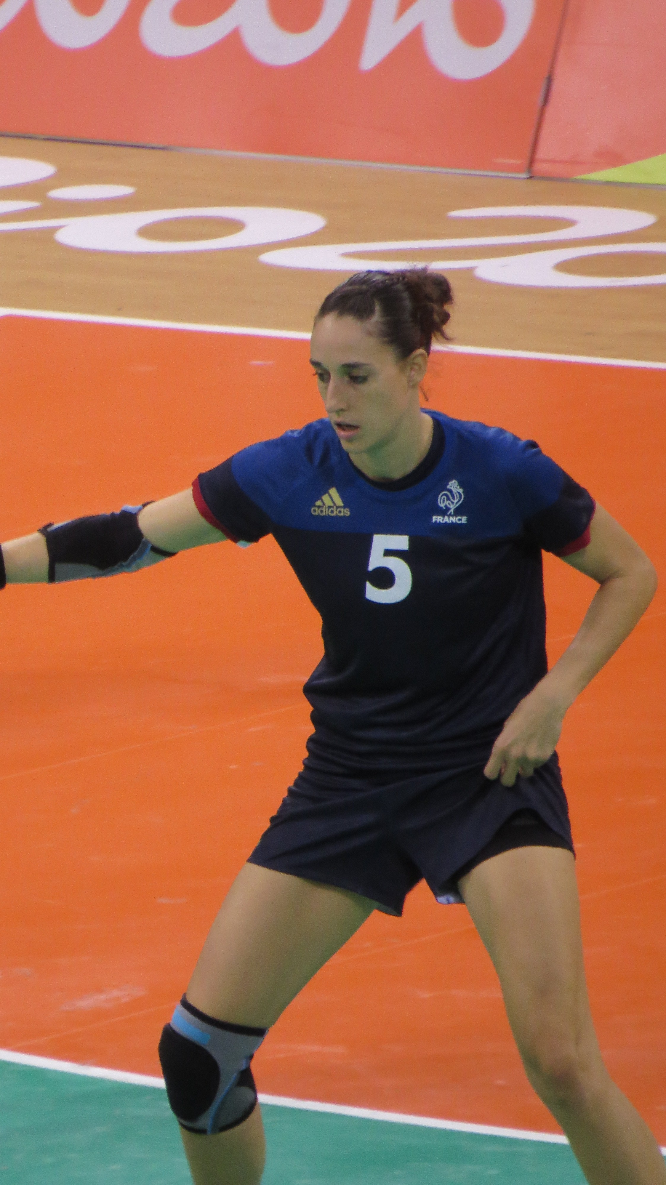 Rio 2016. sx 223